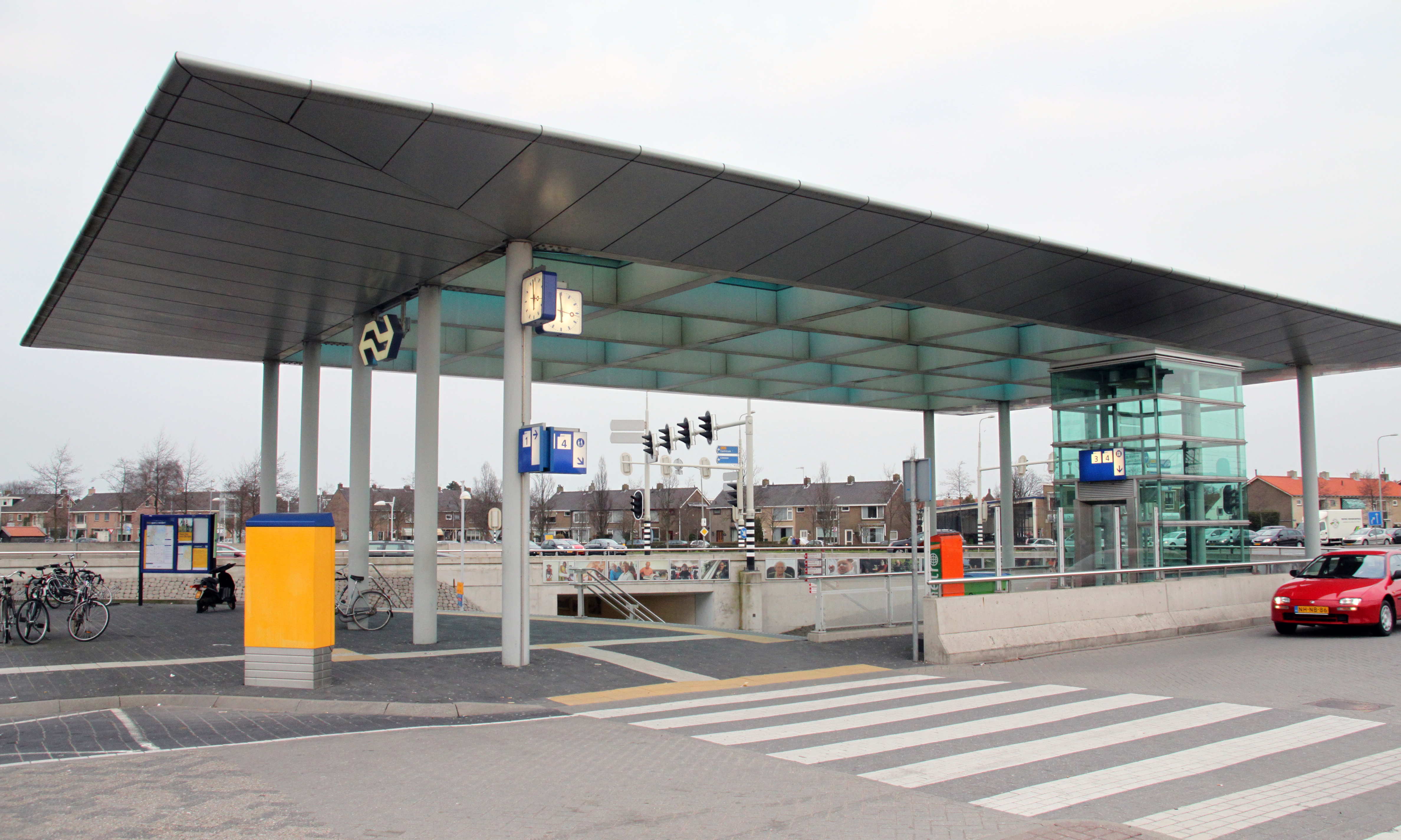 De toegang tot station Uitgeest.